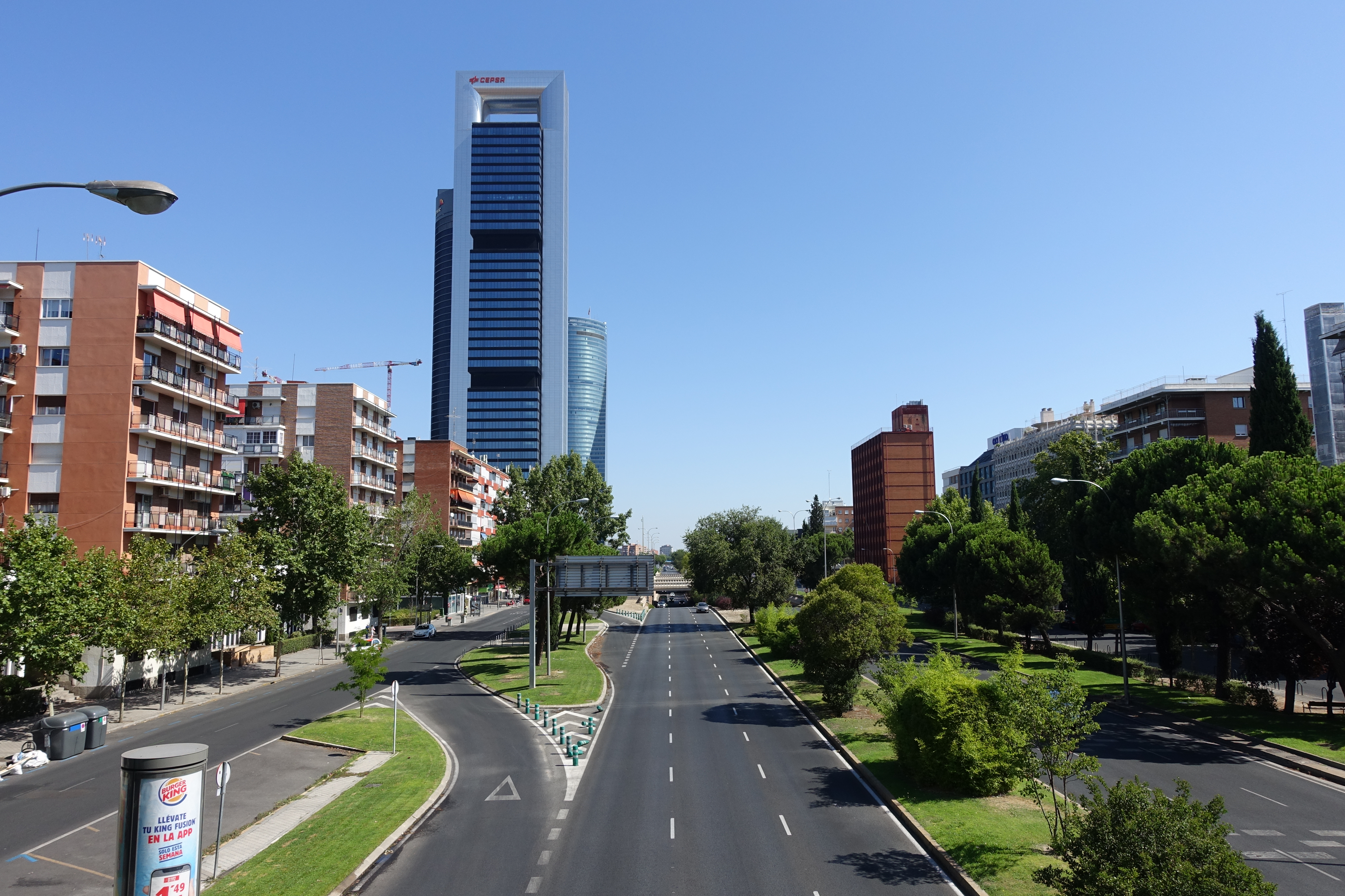 Cuatro Torres Business Area con Paseo de la Castellana